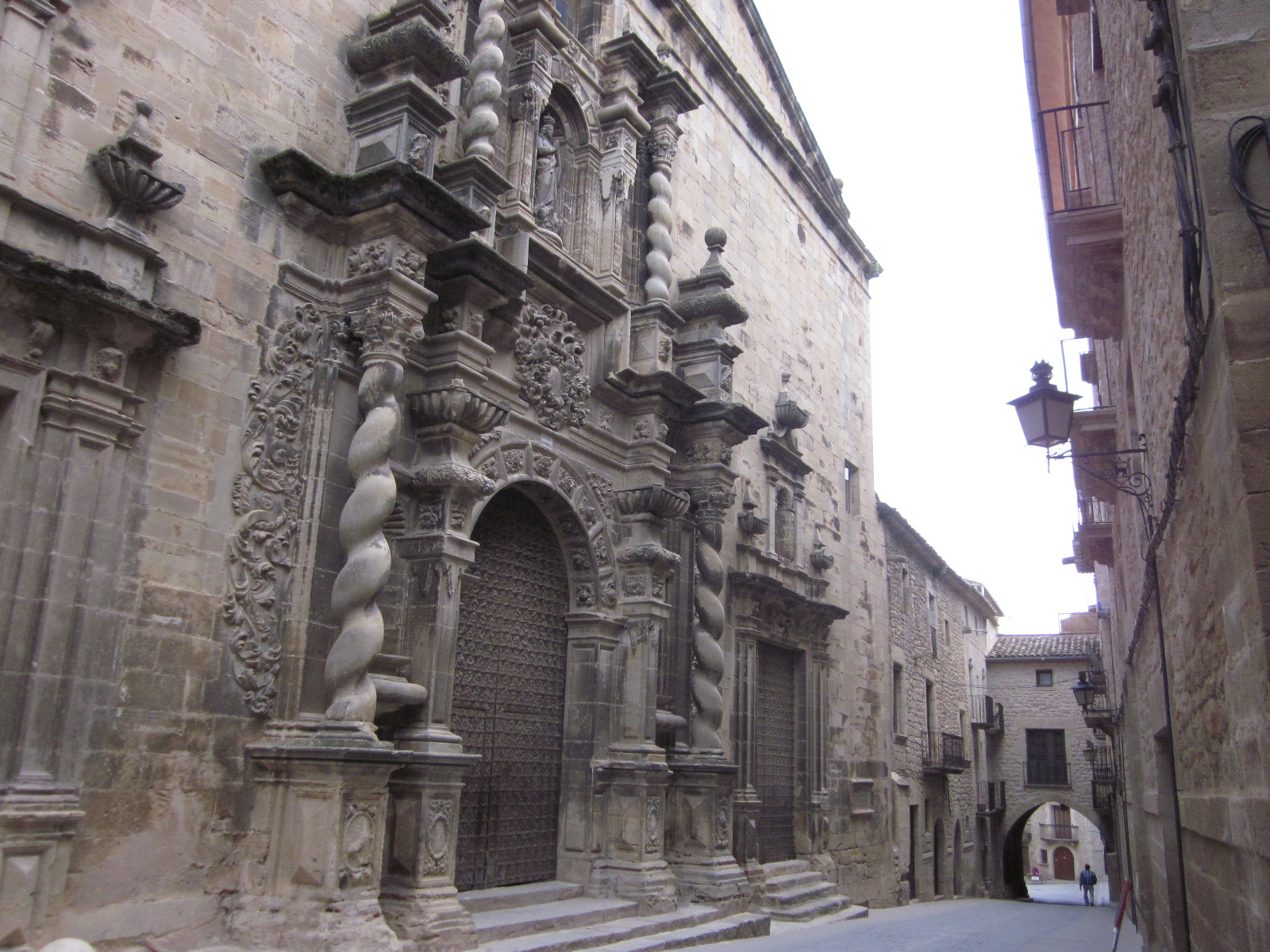 Església de l'Assumpció a Calaceit, Matarranya, Franja de Ponent